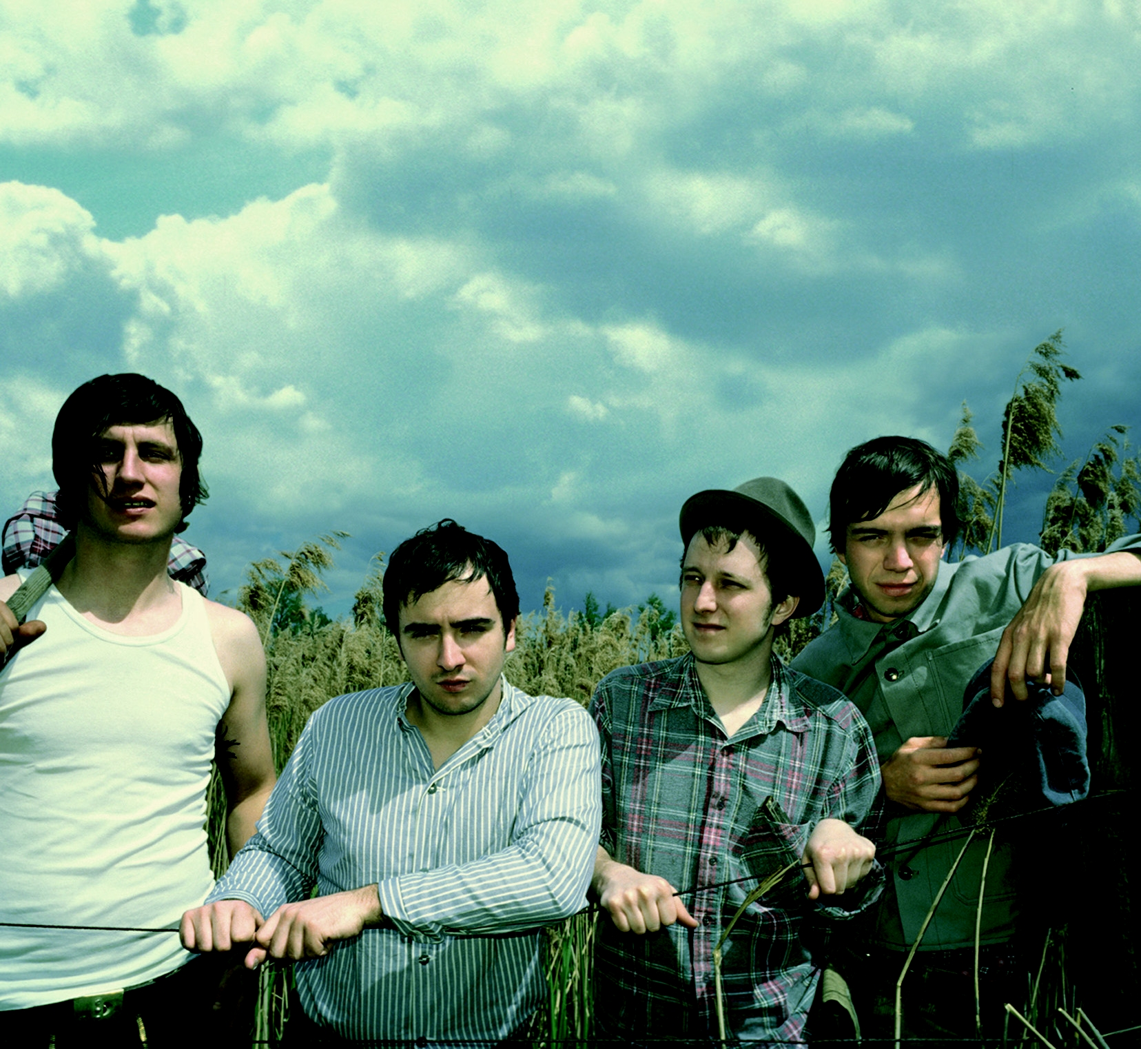 German Band Virginia Jetzt!